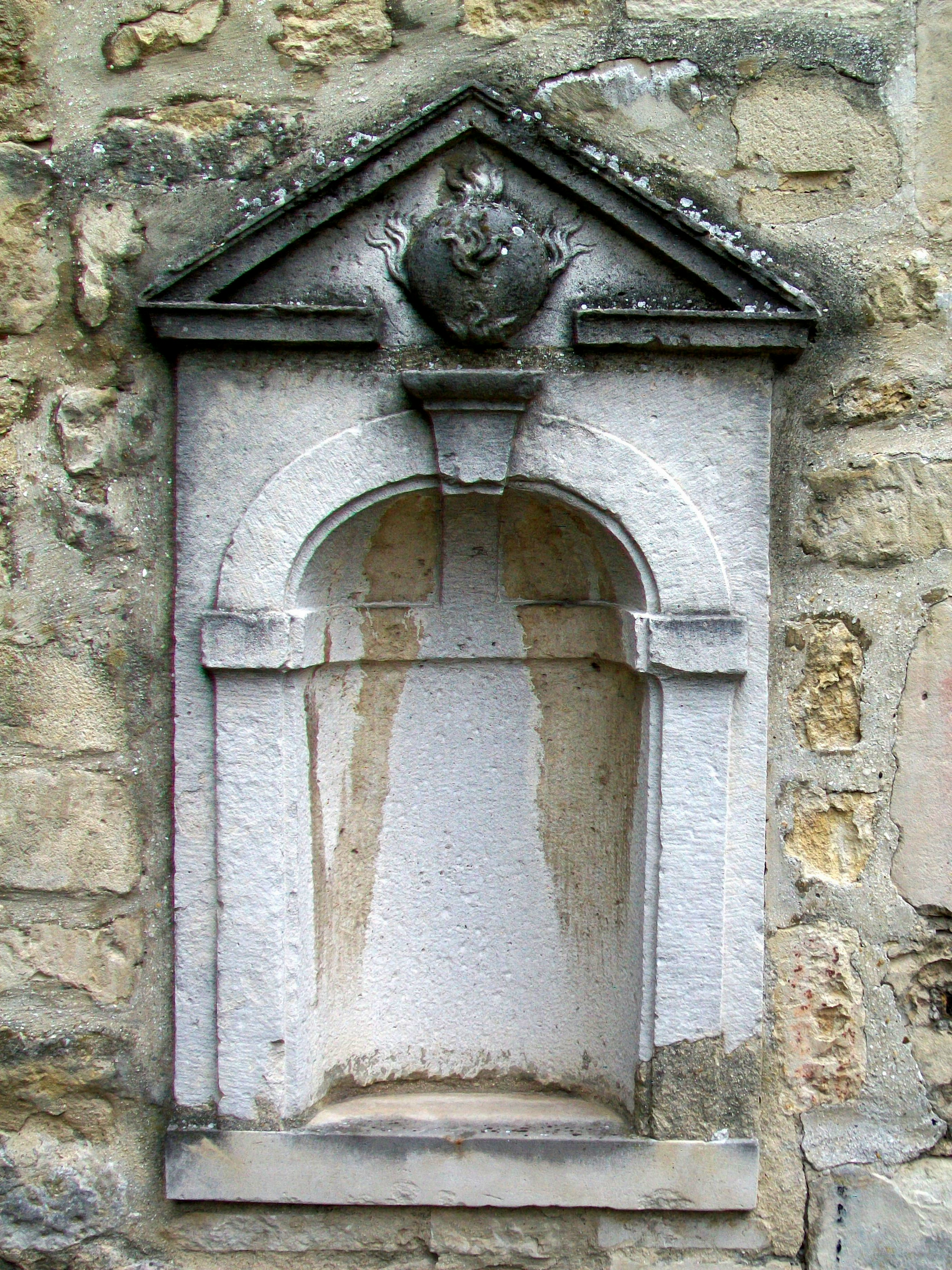 L'ancienne fontaine Sainte-Prothaise, place aux âateaux.